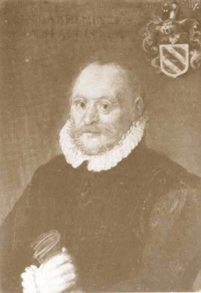 Jan van Hembyze (1513-1584) - Gent - Oost-Vlaanderen - Belgium, leider van de calvinistische Gentse Republiek